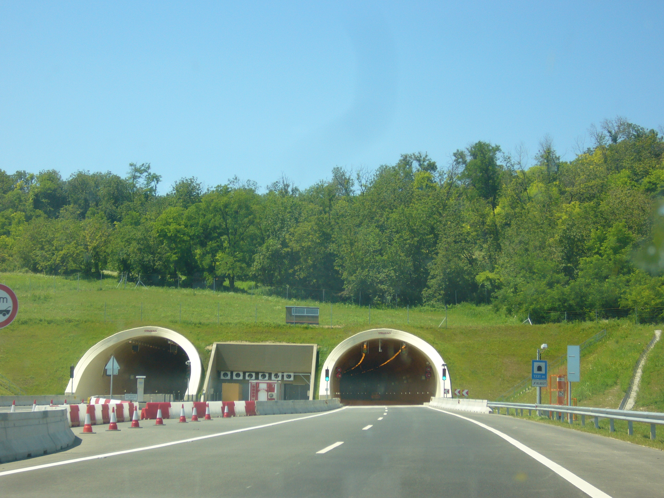 Az M6-os autópálya A jelű Bátaszék alagútjának bejárata (Szekszárd és Véménd között)